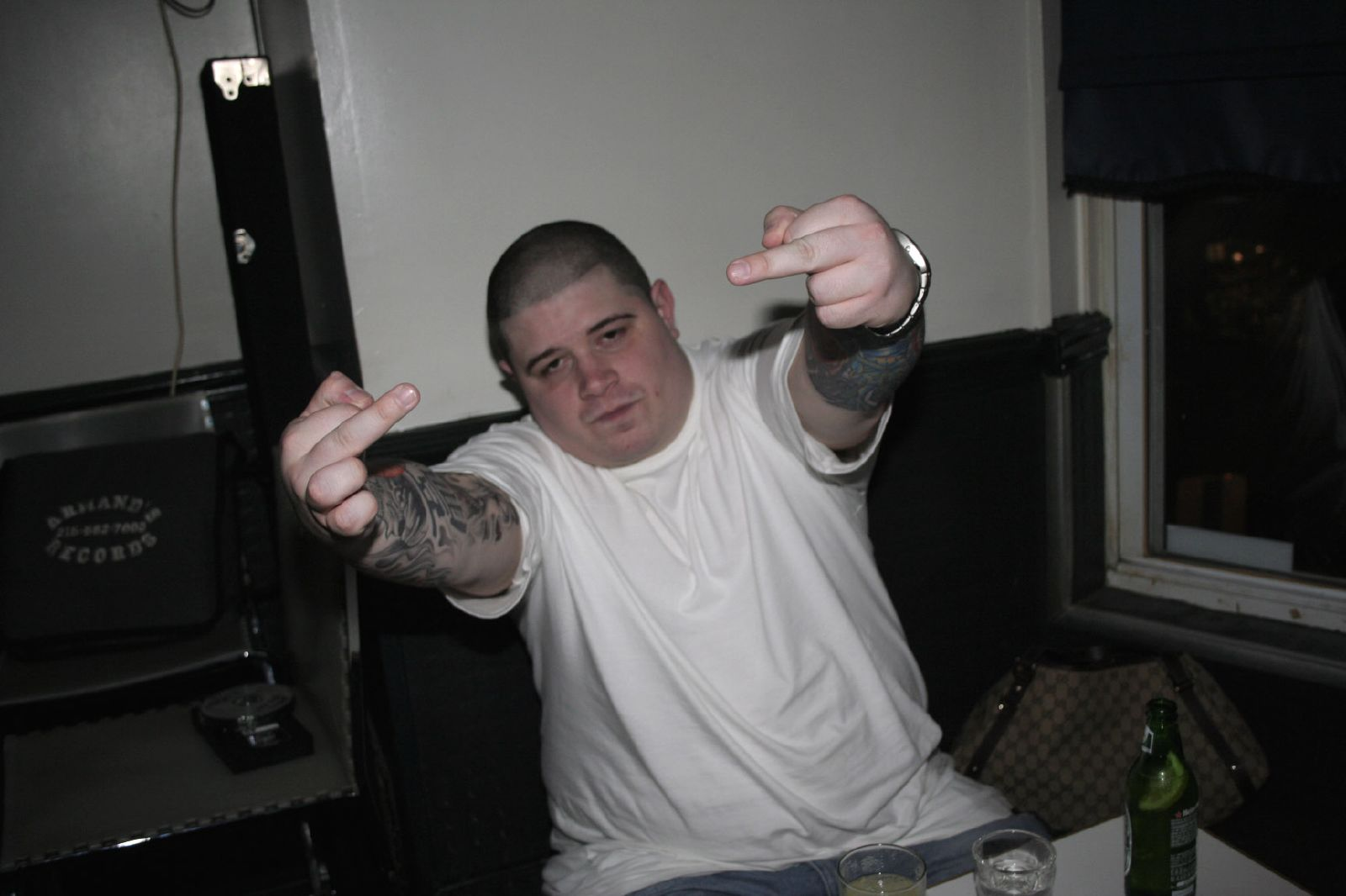 Vinnie Paz in Philadelphia.